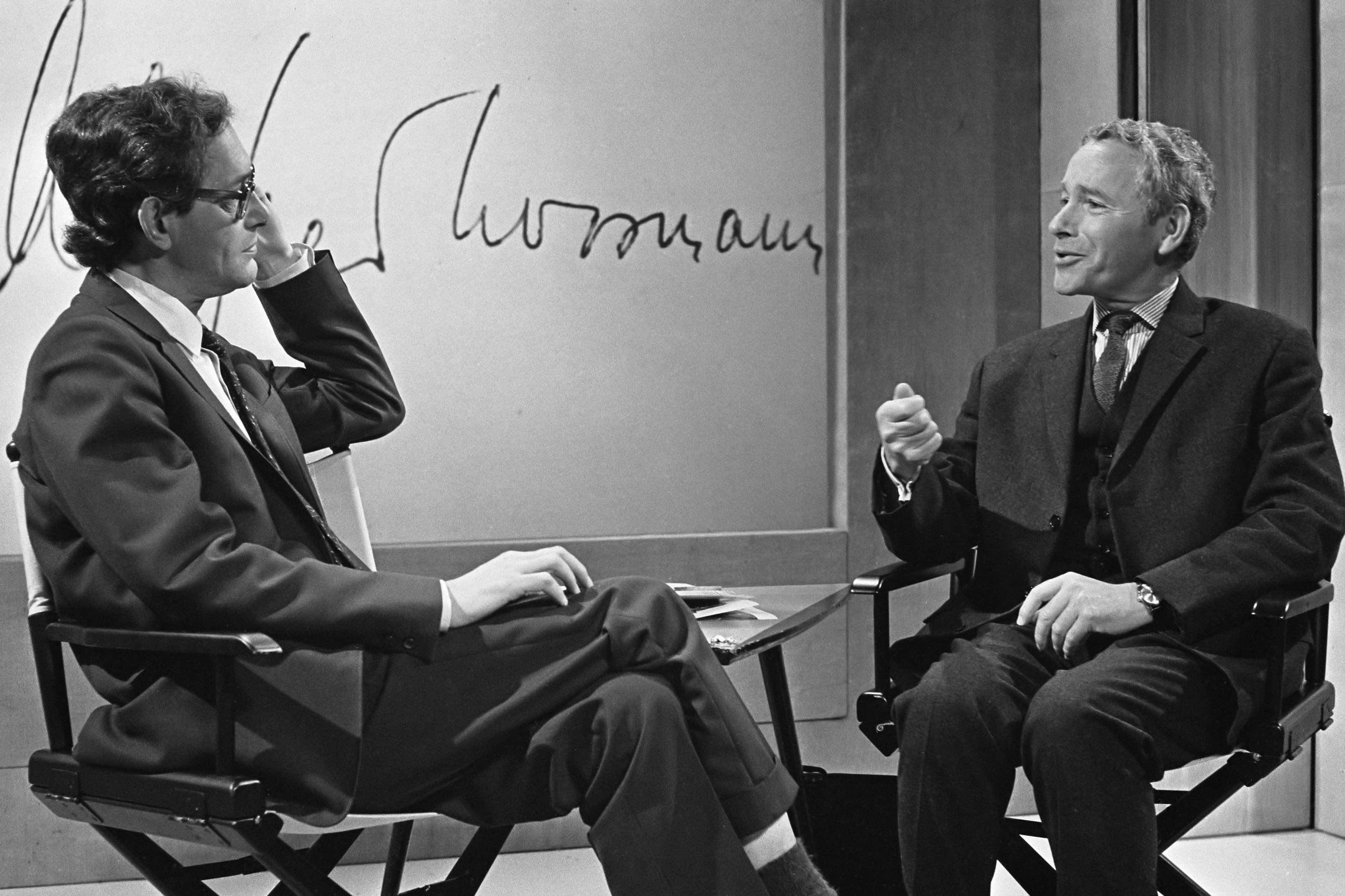 Literaire ontmoetingen, links dhr. Alfred Kossmann, rechts Adriaan van der Veen tijdens interview 18 oktober 1967